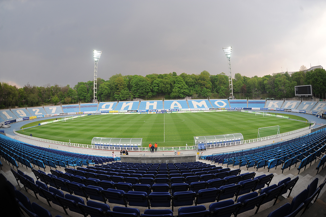 Стадион Динамо